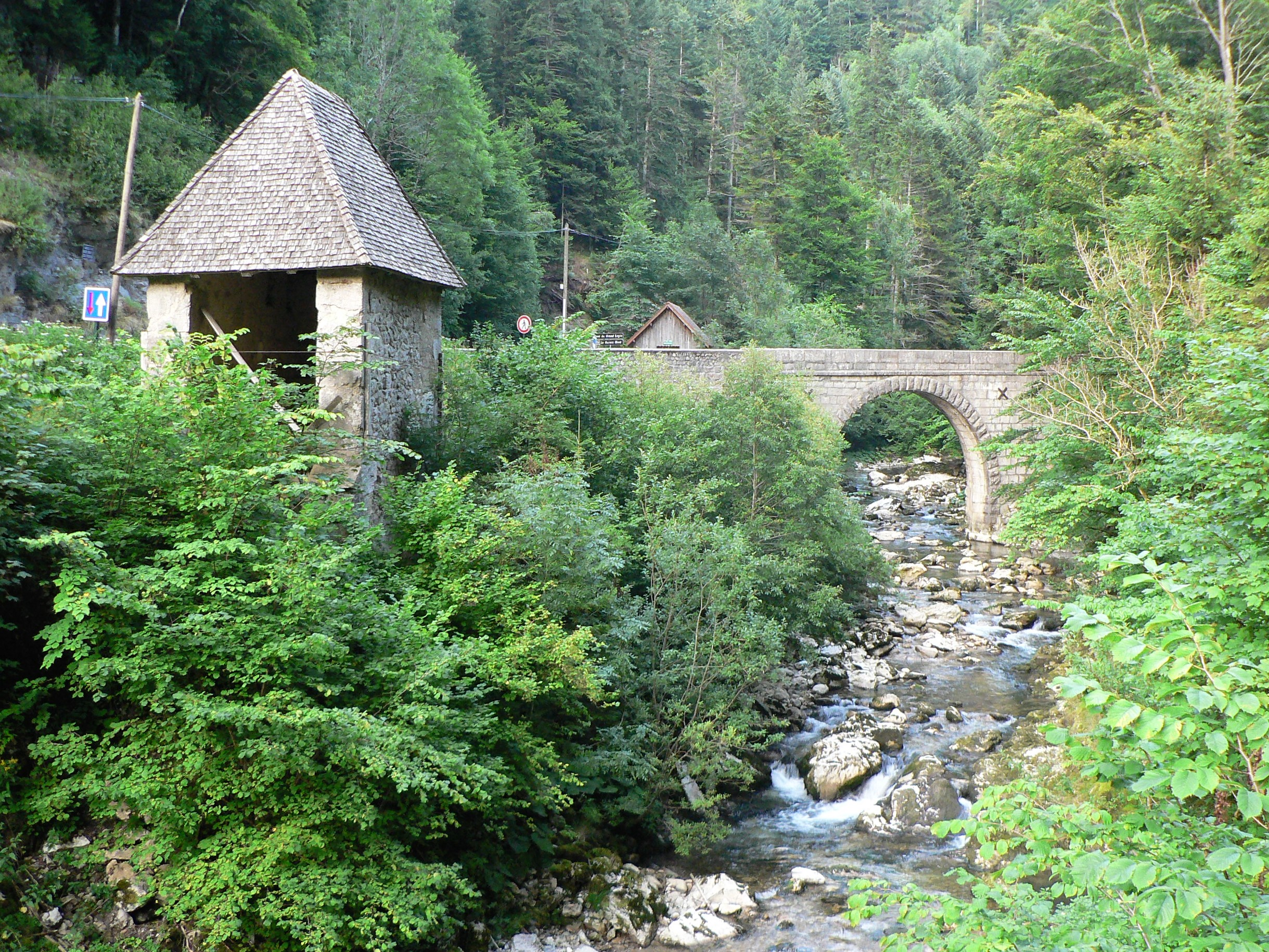 "La "porte de l'enclos" était l'entrée au Désert de la Grande Chartreuse où ne passaient ni femmes ni hommes armés. Ici, à côté d'une grotte reliée à la route par un pont piéton, on trouve une statue qui celèbre l'amitié entre le monastère et les habitants. En proximité sur le Guiers se trouve le pont de Valombre.